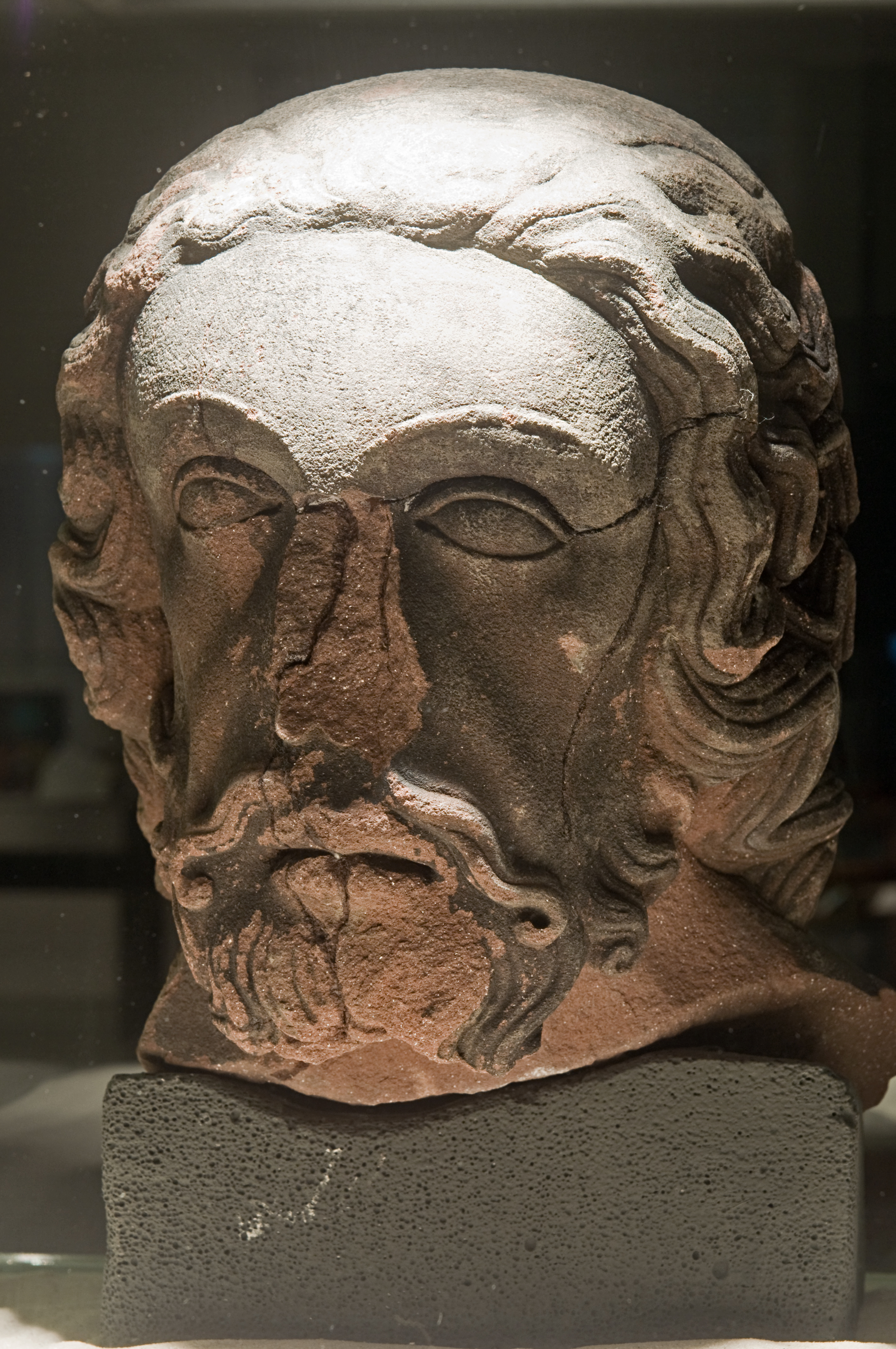 Historisches Museum Frankfurt am Main Meister Antze: Kopfbild des Hl. Bartholomäus vom Frankfurter Galgentor, ca. 1352